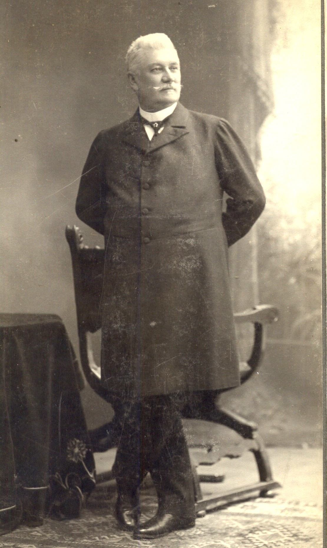 Id. Rimanóczy Kálmán fotója az 1890-es évekből